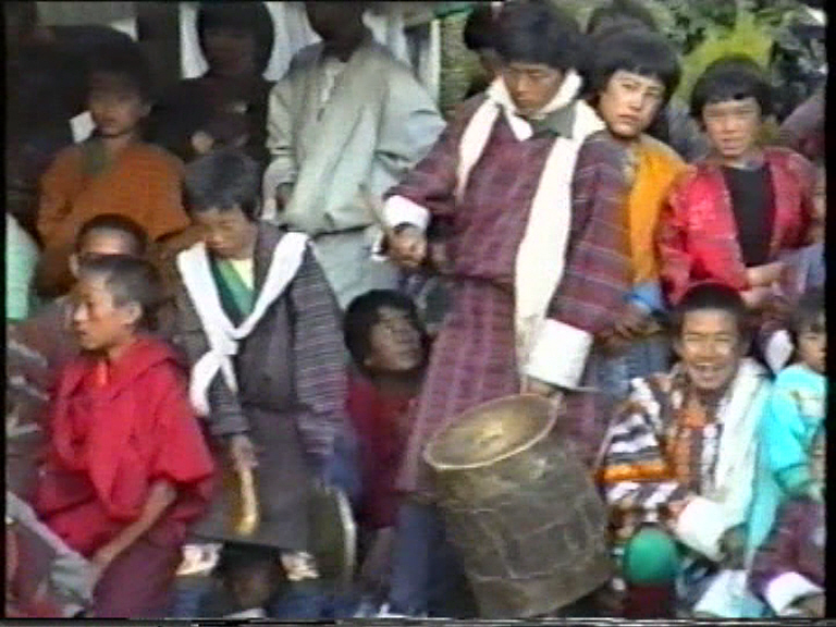 Jakhar City, Tamshing-Lhakang monastery, Bhutan